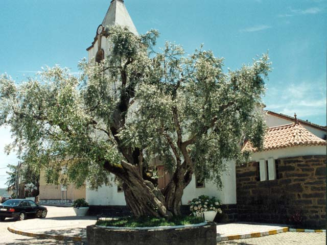 Oliveira centenária em Montes da Senhora, Proença-a-Nova - Portugal.